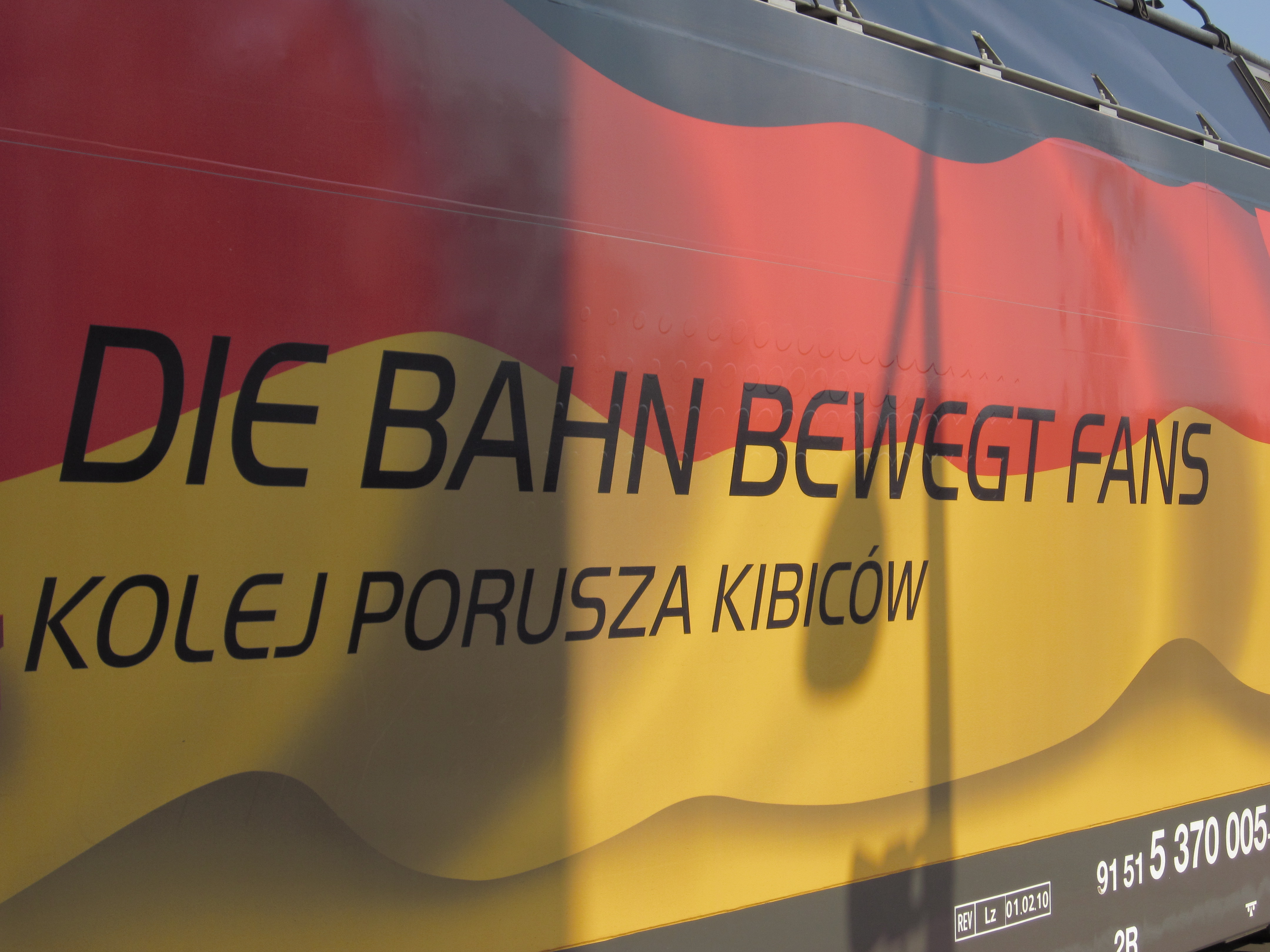 Kolej porusza kibiców w języku niemieckim.